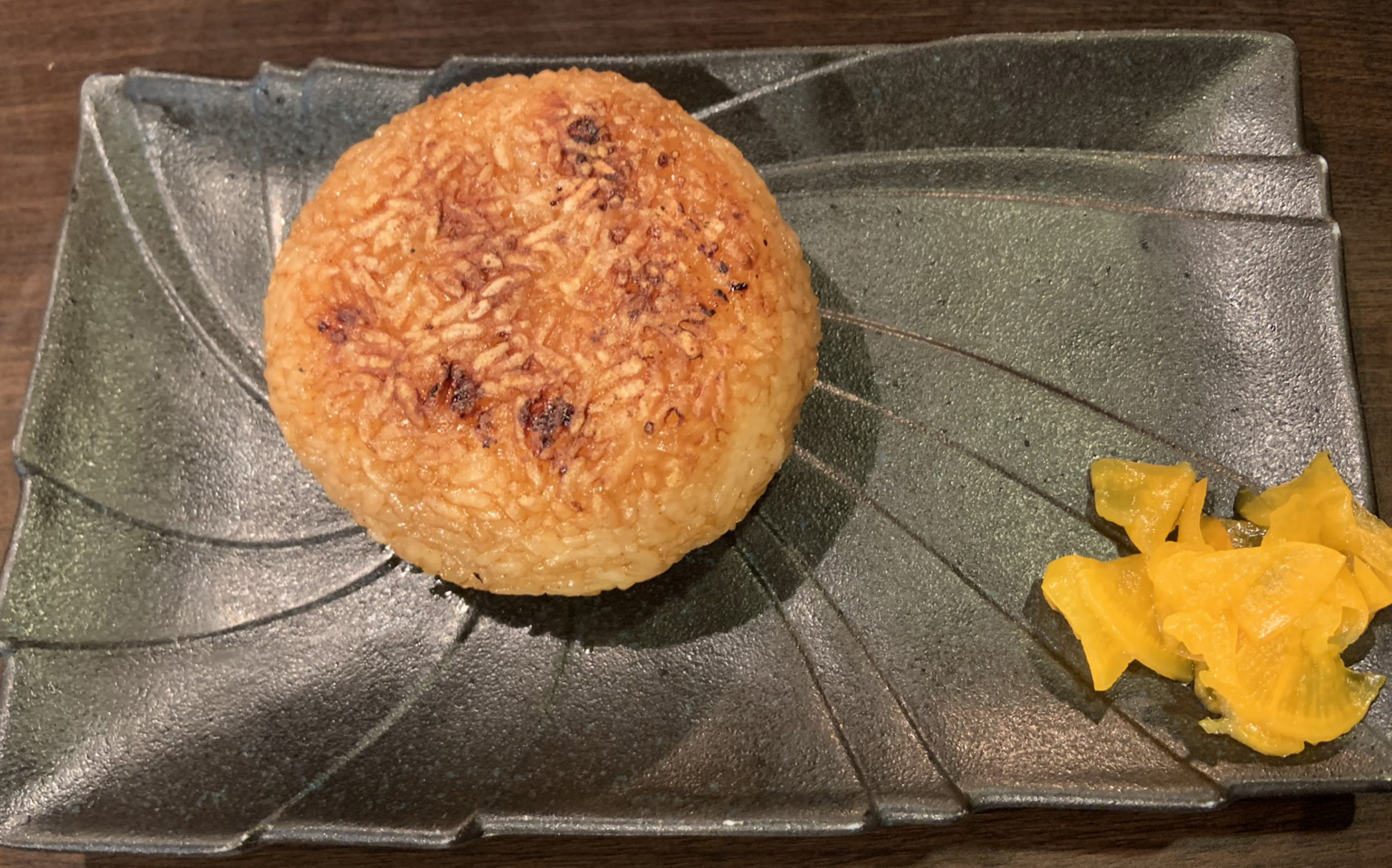 焼きおにぎりと沢庵漬け。2019年11月5日、鳥取市内の料理店で撮影。